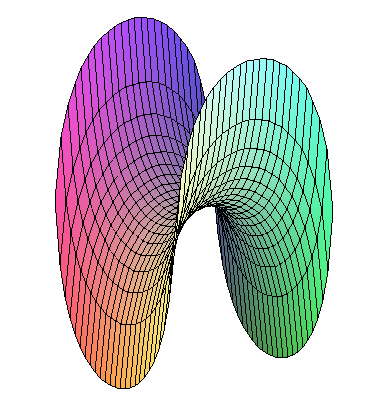 Scherksche Minimalfläche zum Parameter c=1